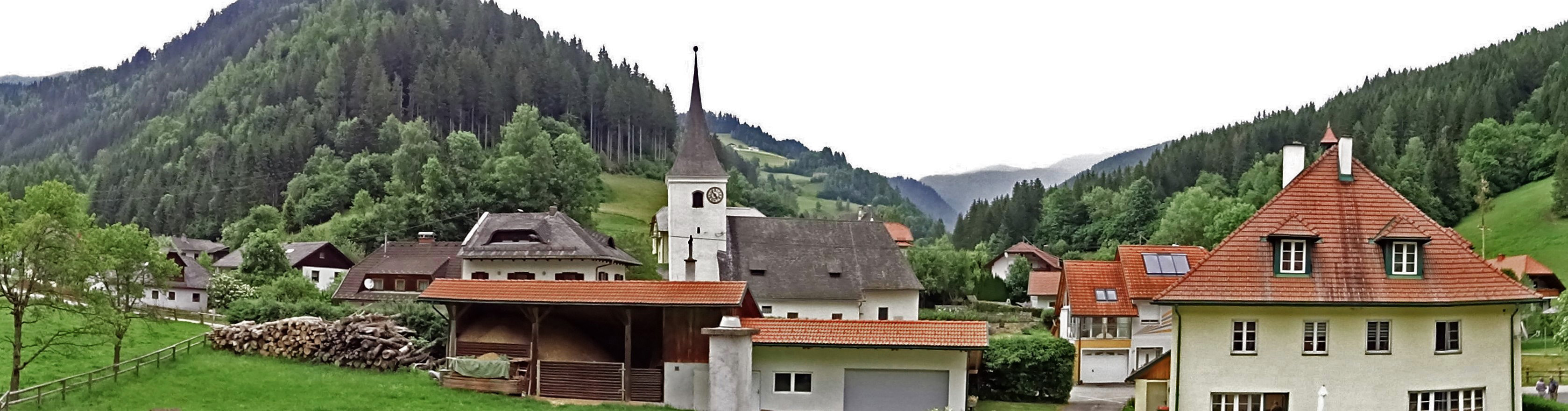 Ortschaft Ingolsthal (Friesach) mit röm.-kath. Pfarrkirche